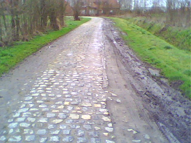 1ère partie du Carrefour de l'Arbre